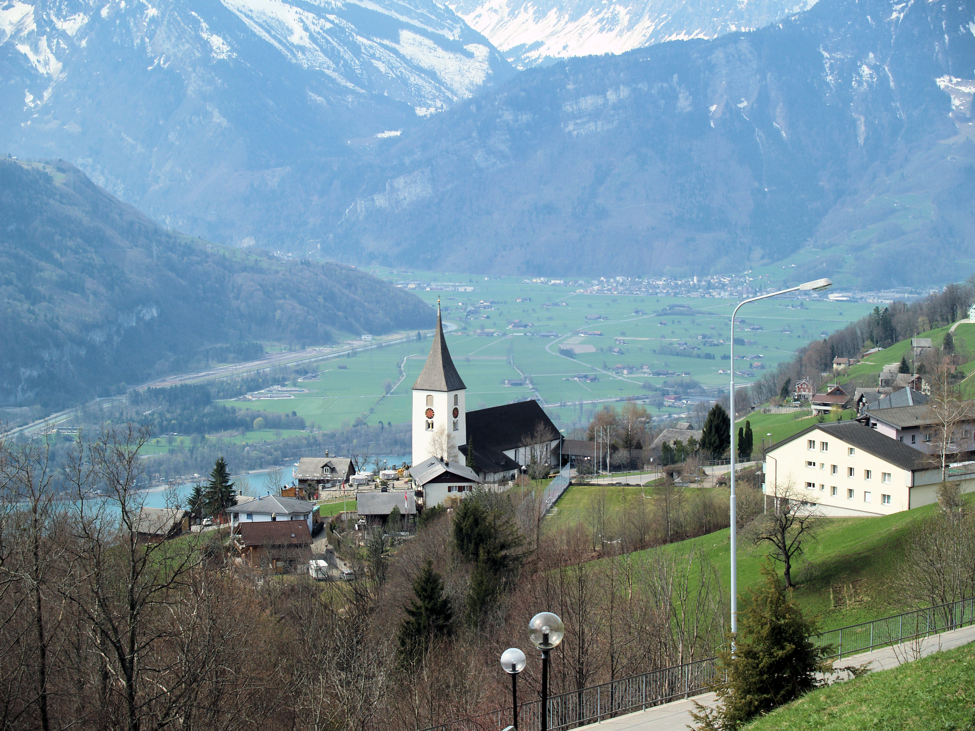 Die Pfarrkirche St. Gallus Amden. Blick von der Treppe bei der Bergkirche.